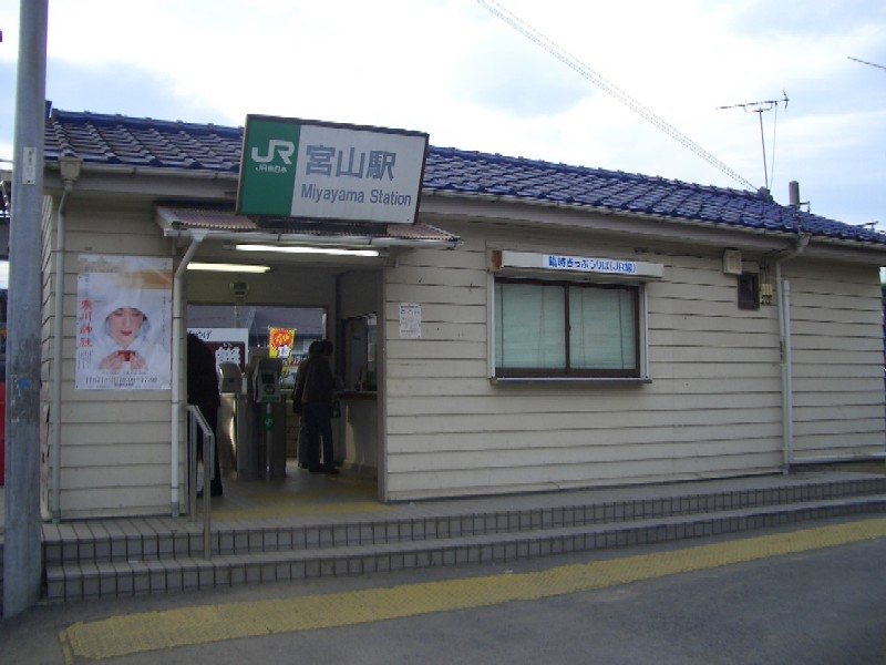 Miyayama Station on JR Sagami Line, Samukawa, Kanagawa 宮山駅